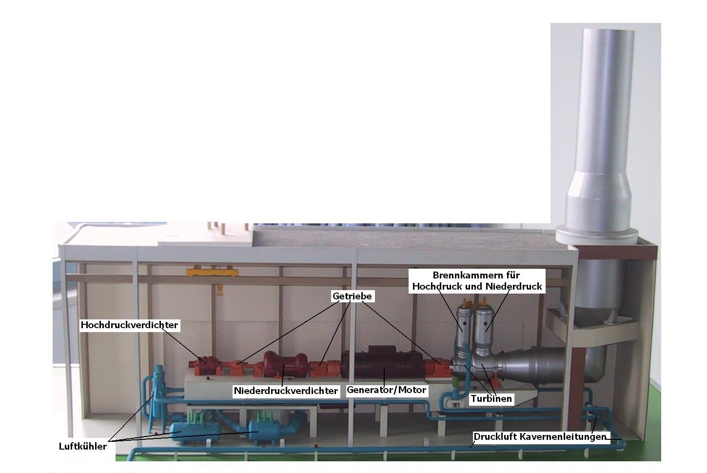 Modell vom Kraftwerk Huntorf. Das Kraftwerk Huntorf ist ein kombiniertes Druckluftspeicher- und Gasturbinenkraftwerk in Huntorf bei Elsfleth in Niedersachsen. Das Kraftwerk war bei seiner Inbetriebnahme 1978 das erste kommerziell genutzte Druckluftspeicherkraftwerk der Welt.